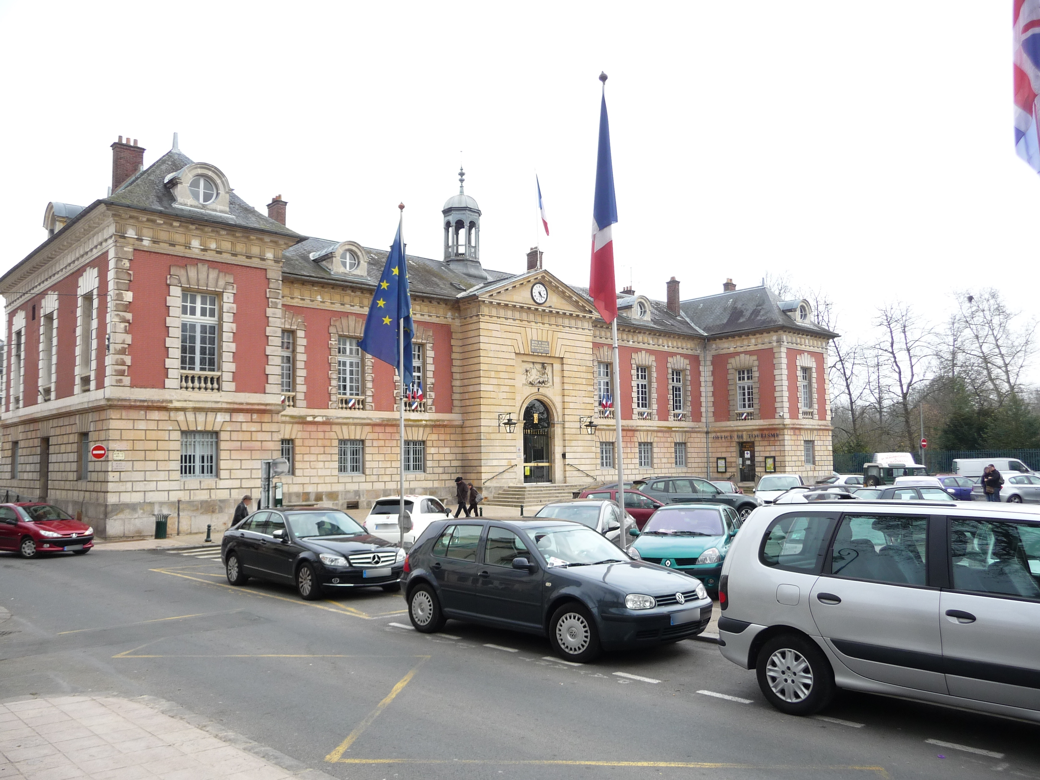 La mairie de Rambouillet